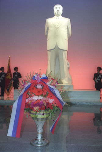 The Kim Il-sung Mausoleum (Kumsusan Memorial Palace). In PYONGYANG.